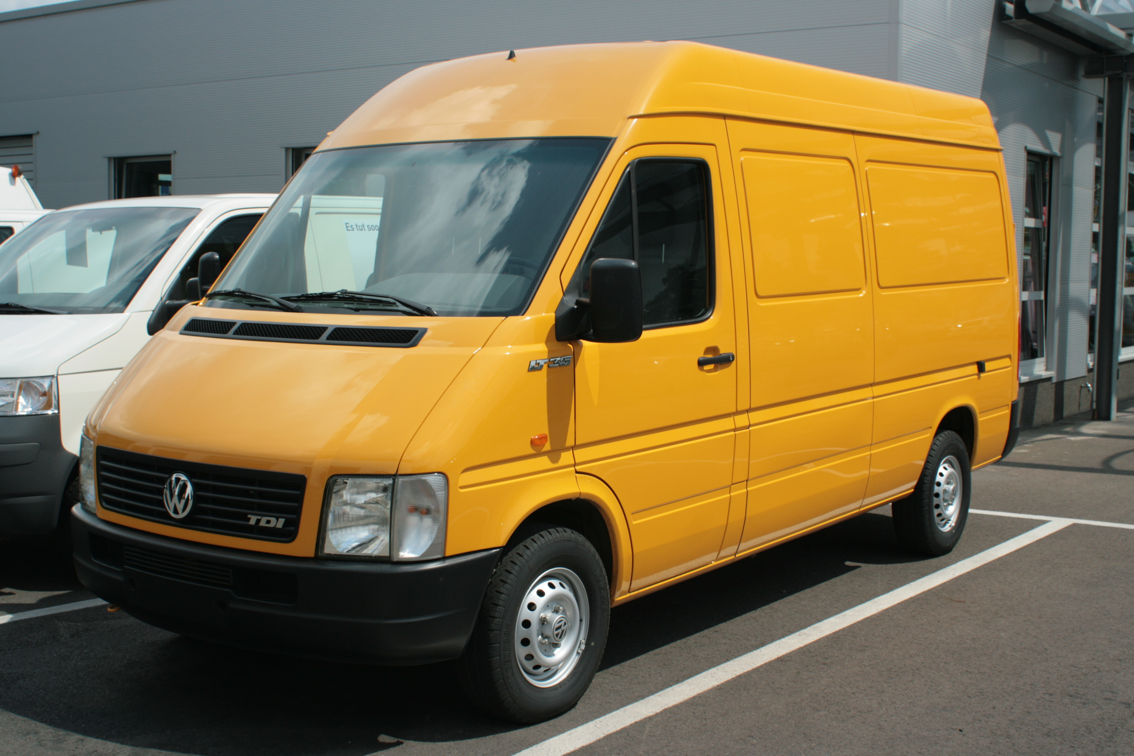 VW LT35 Kastenwagen gelb Hochdach MR.